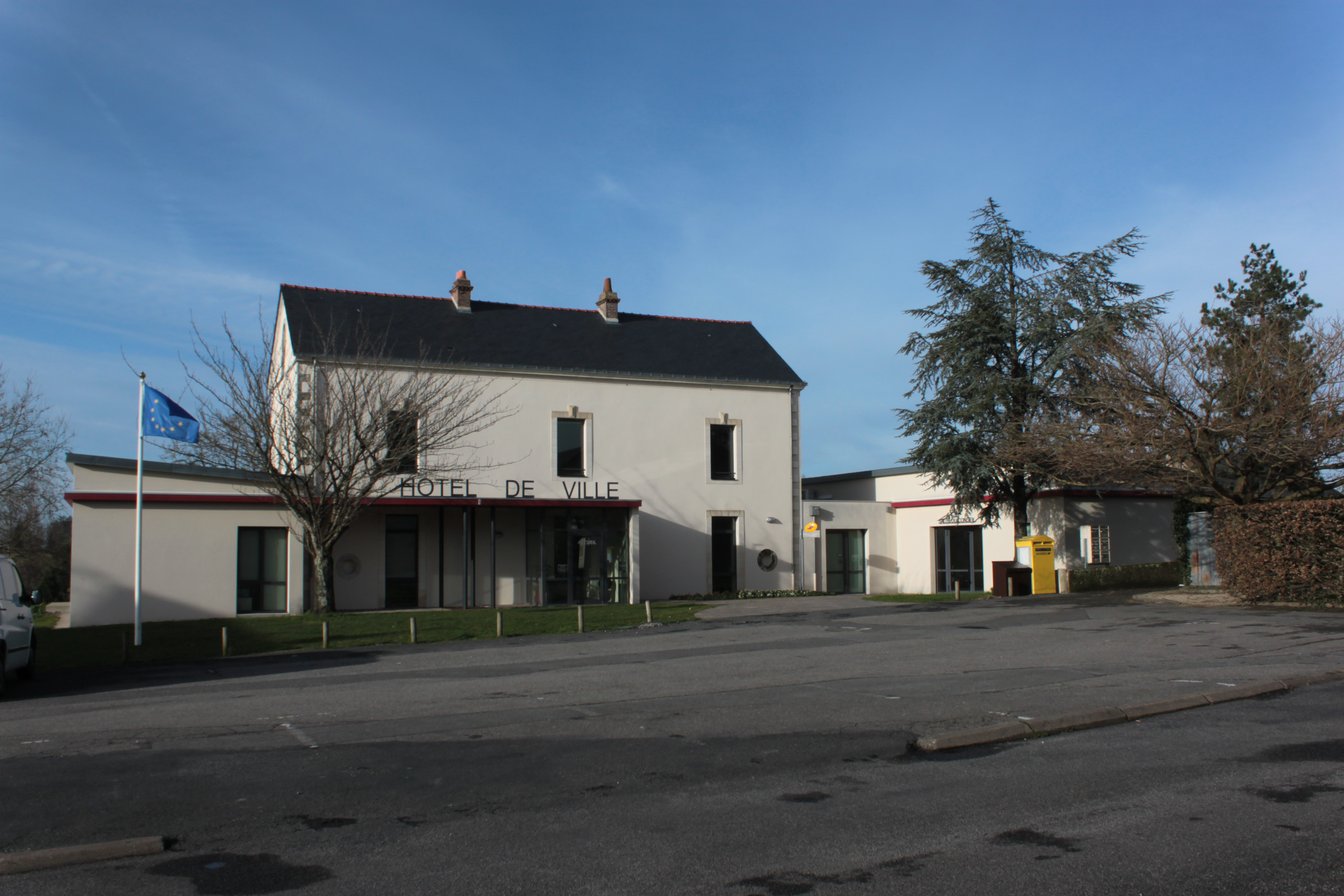 Mairie, Fr-44-Le Landreau.